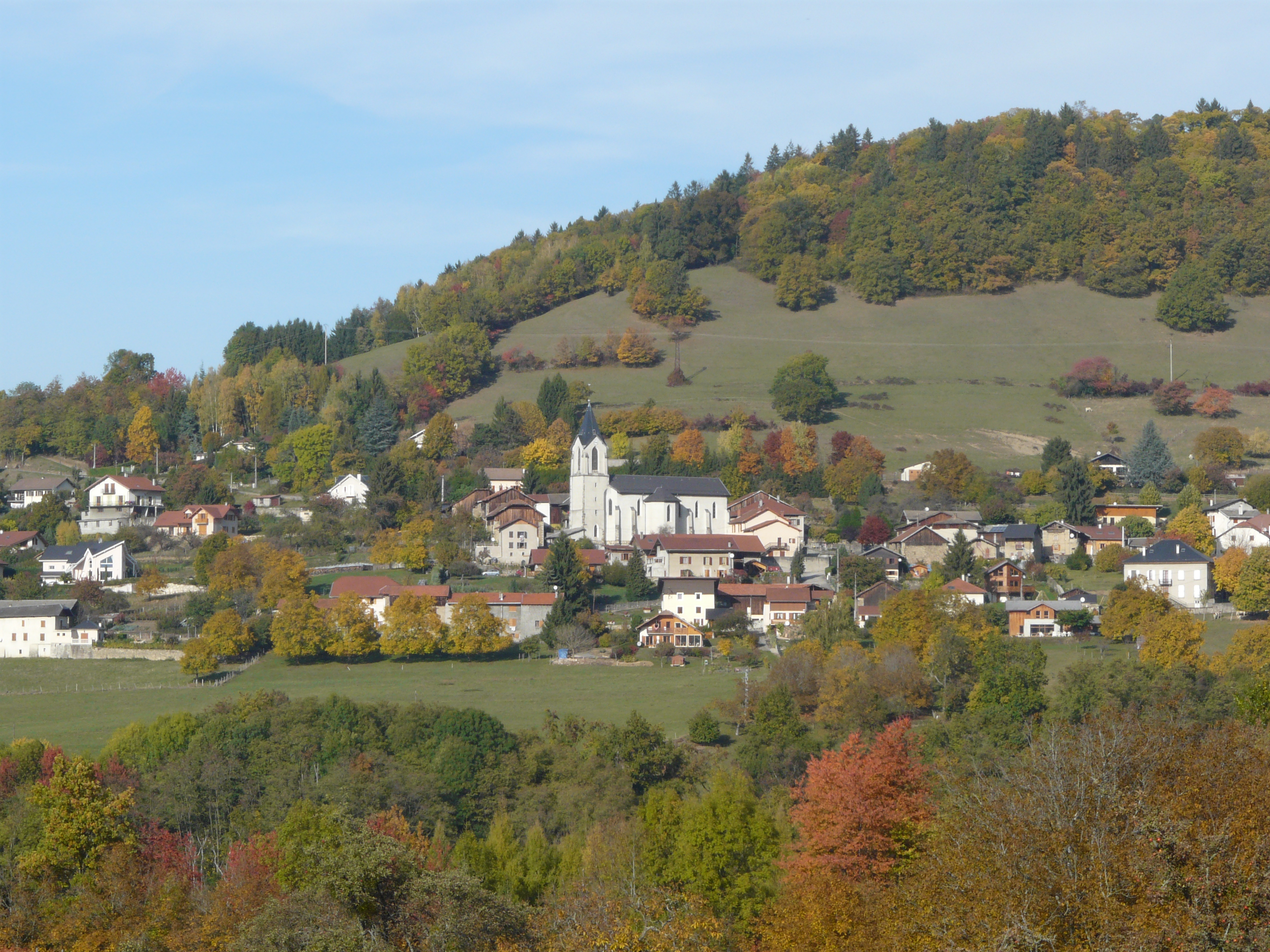 La Chapelle-Blanche (Savoie) vue depuis Bramefraine